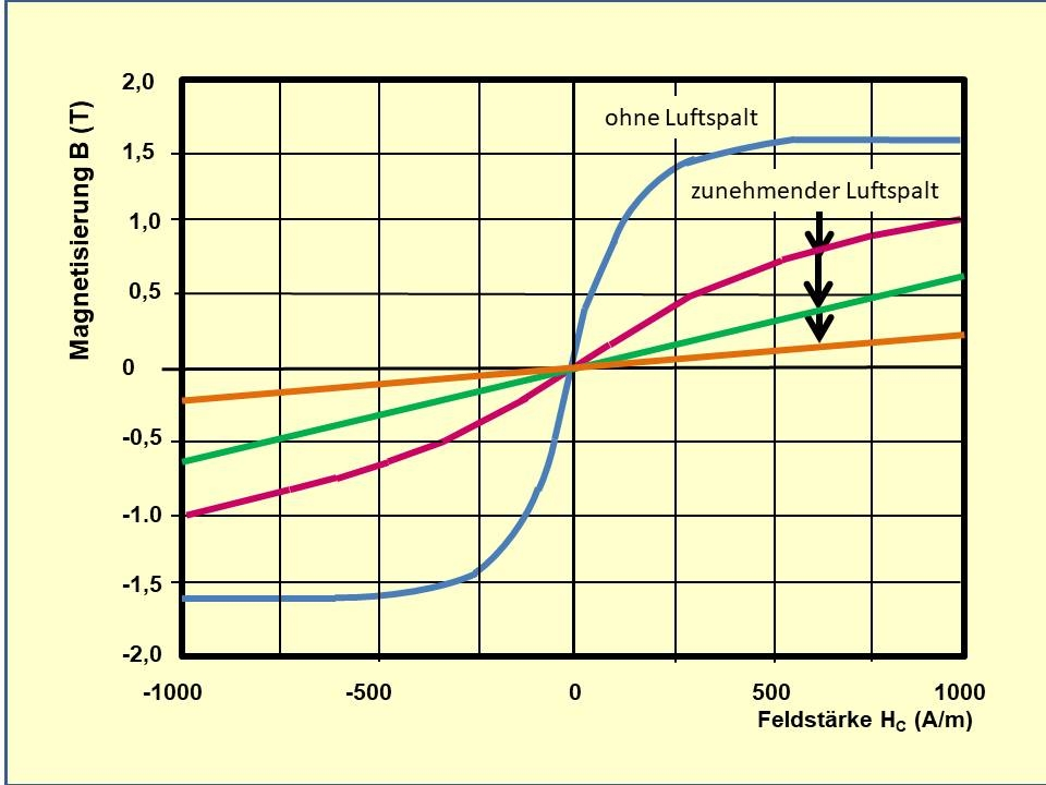 Darstellung der Absenkung der Hysteresekurven durch zunehmenden Luftspalt im magnetischen Kreis